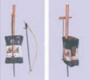 یک رباب